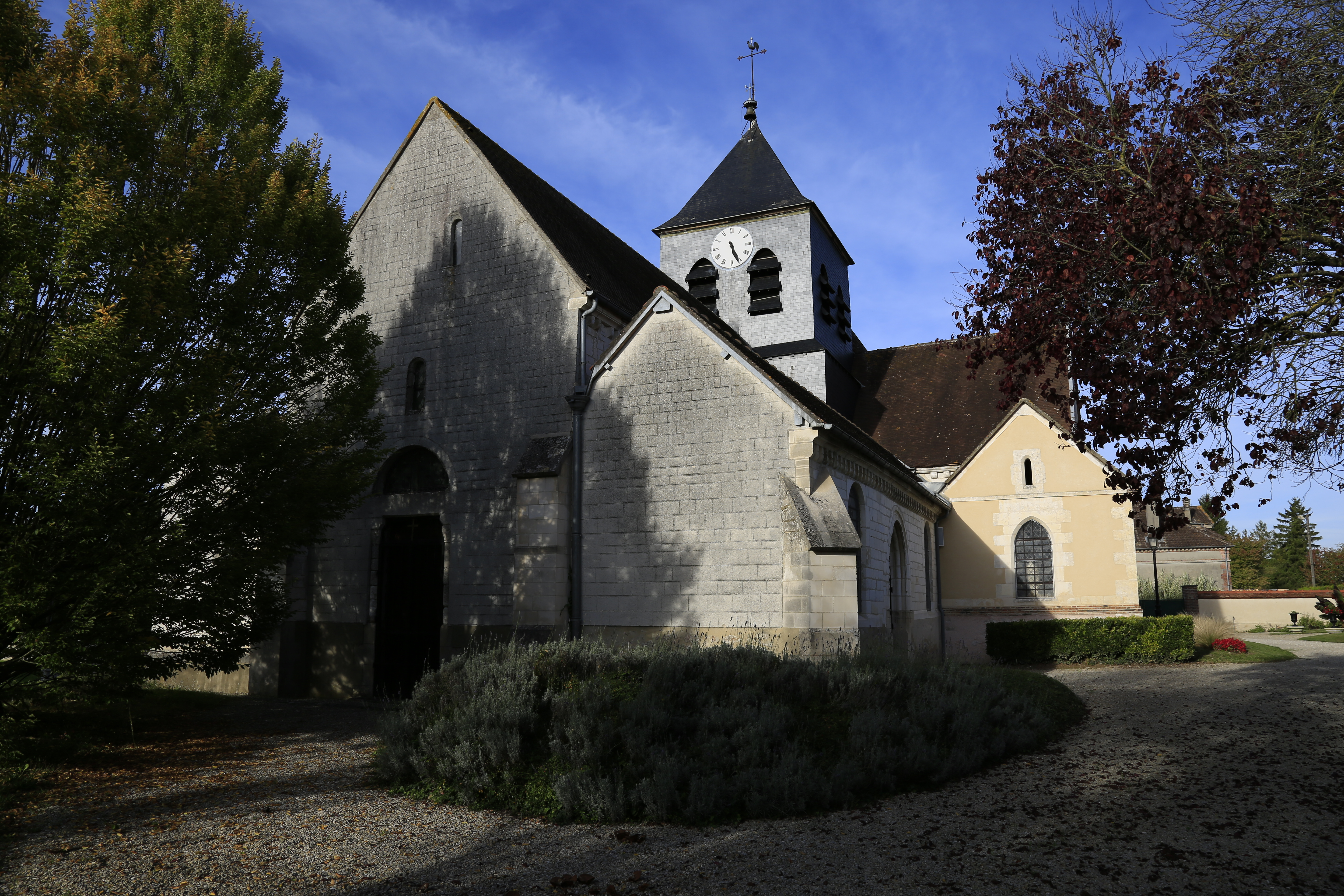 Droupt-Sainte-Marie l'église.